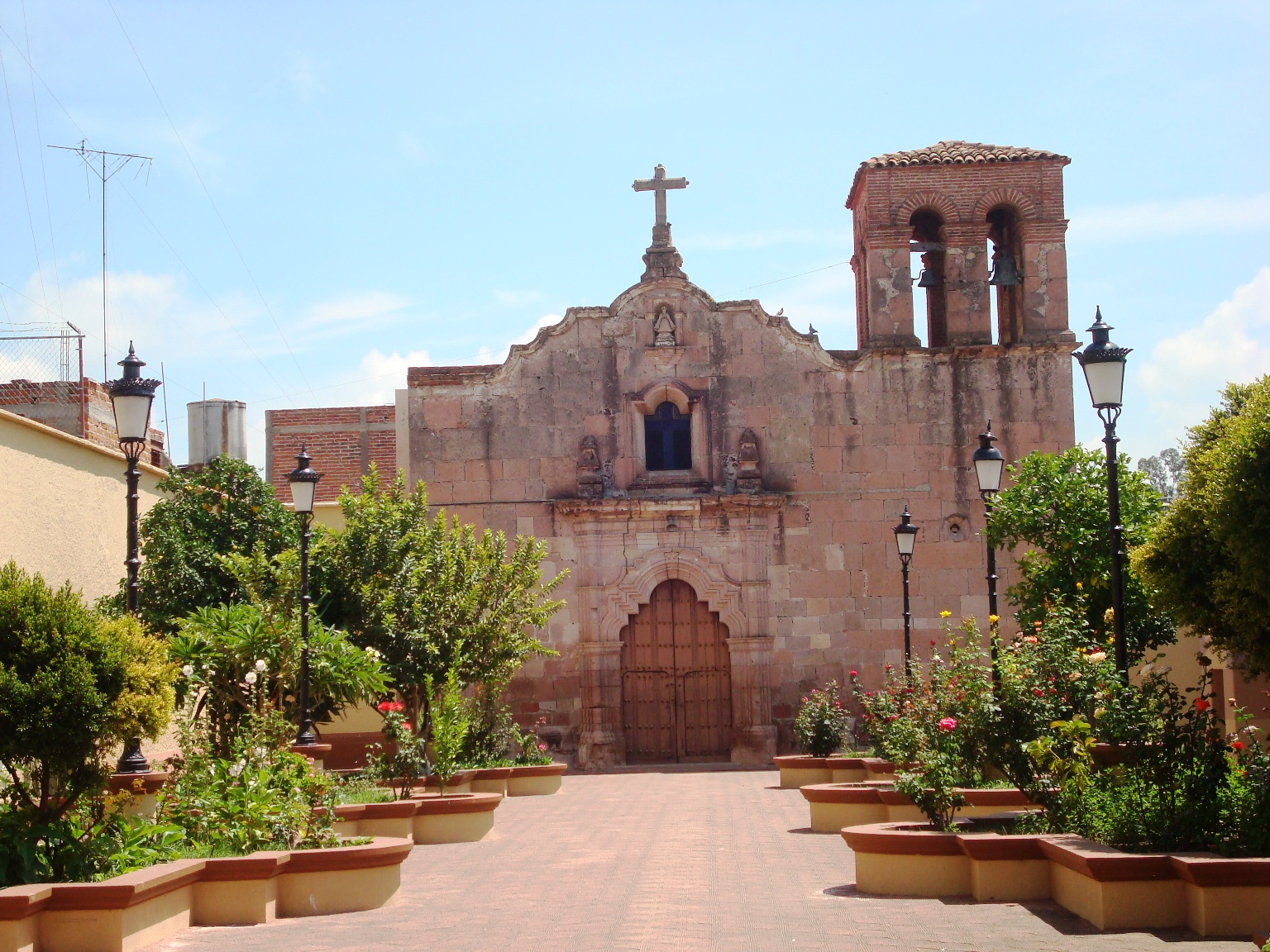 Templo La Purisima de Cocula Jalisco (1532).